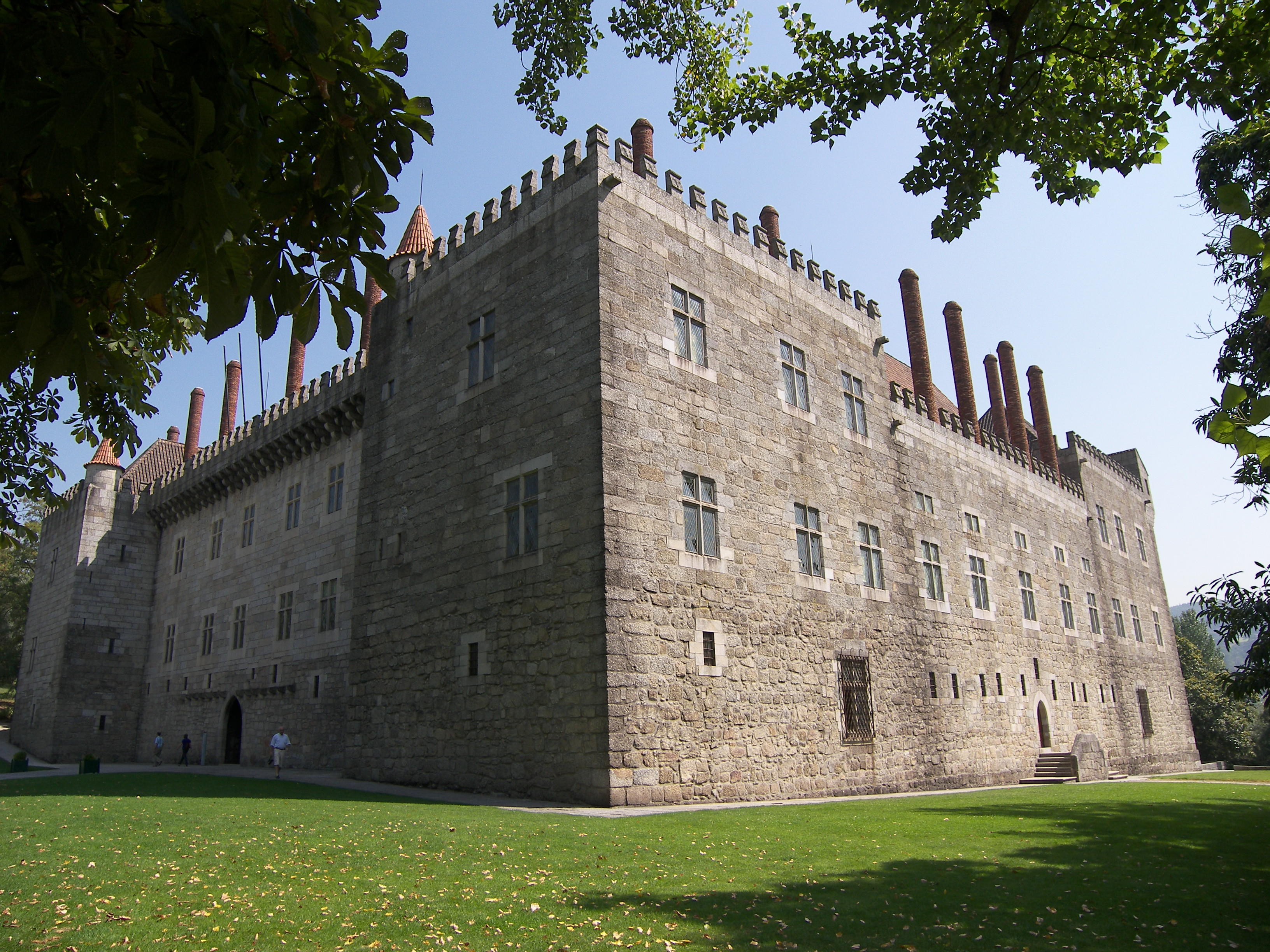 Guimarães Paço Ducal